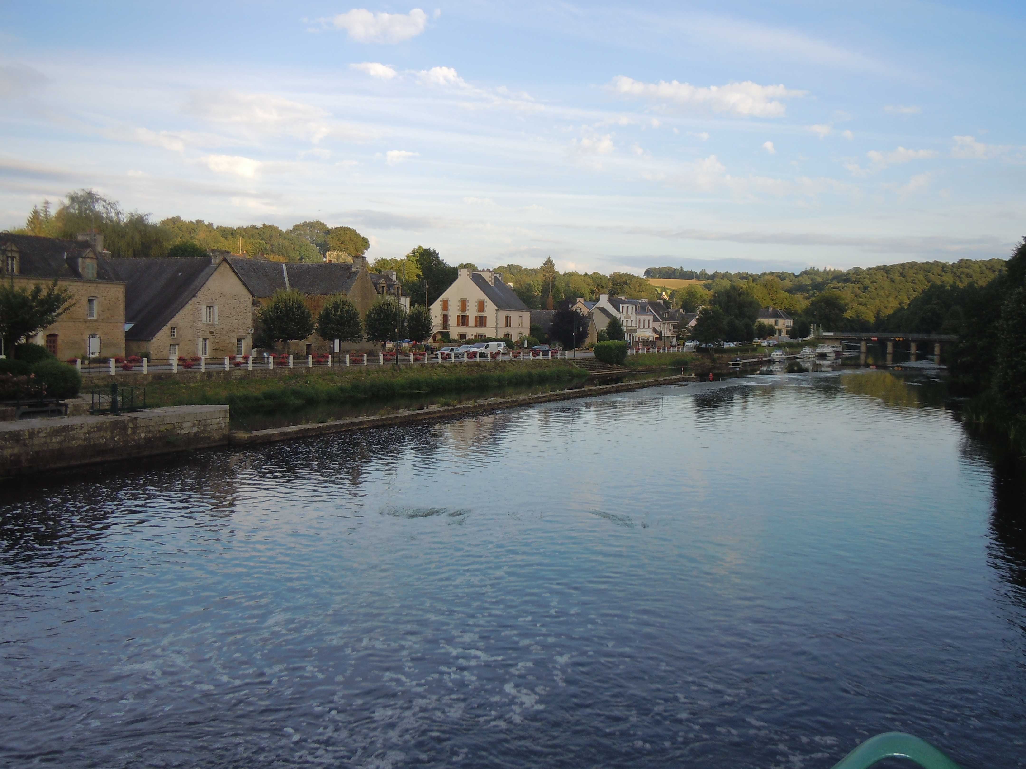 le Blavet à Saint-Nicolas des Eaux, commune de Pluméliau, département du Morbihan, Bretagne